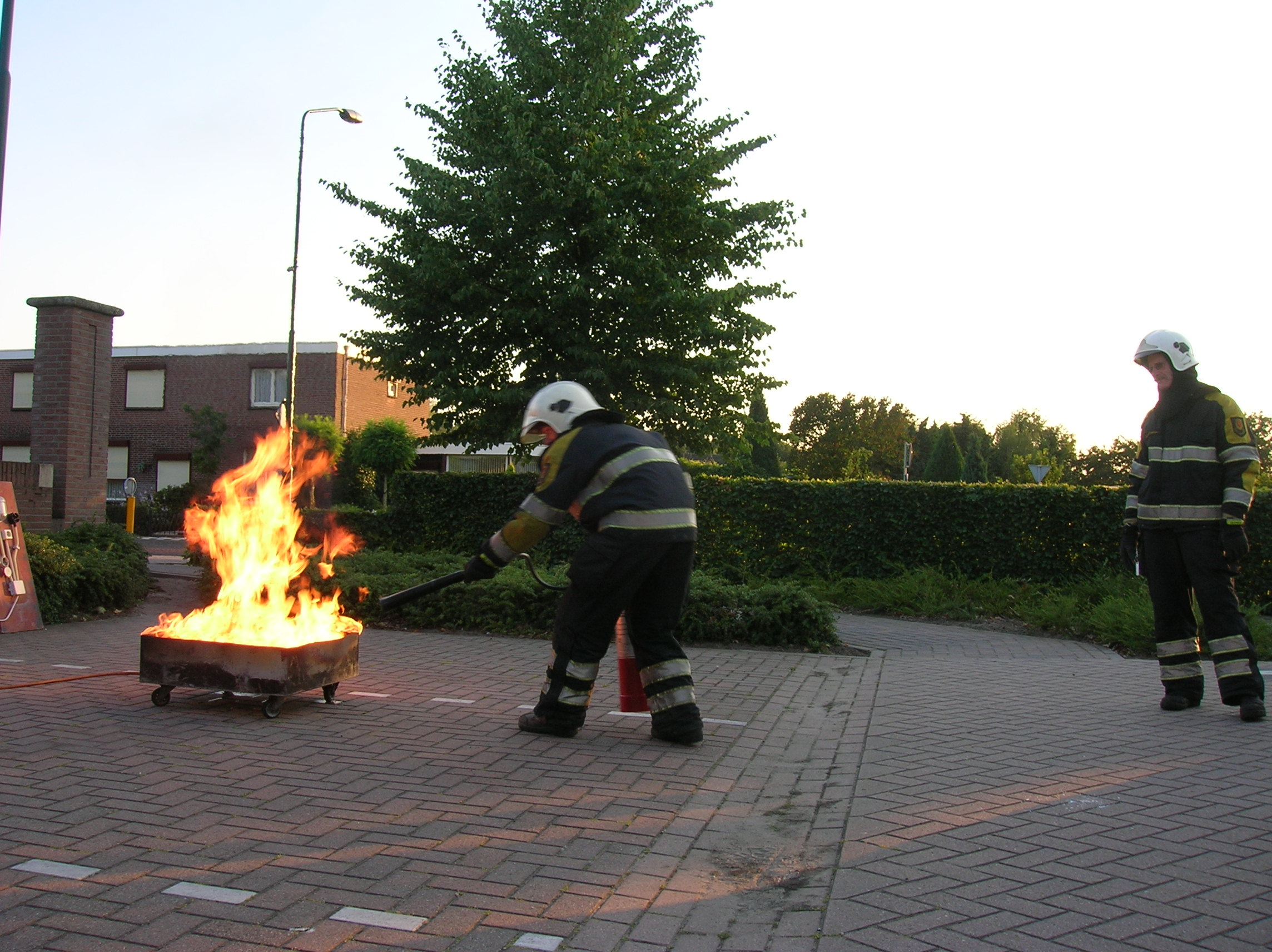 Brandweerlieden tijdens een oefening. Zelfgemaakte foto, GFDL.